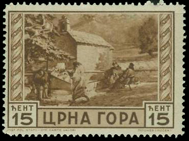 Почтовая марка из последней серии Черногории под итальянской оккупацией.